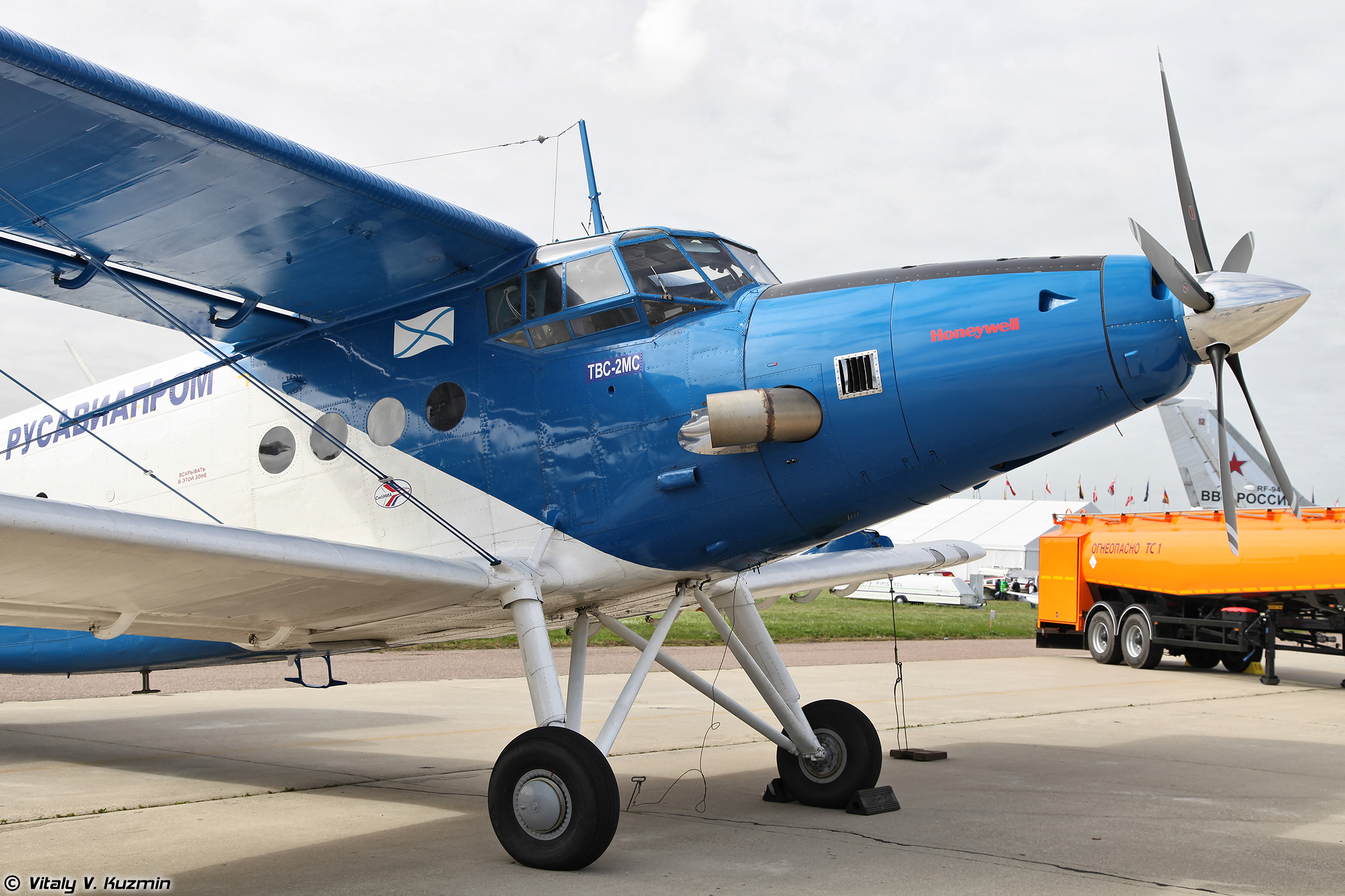 ТВС-2МС (TVS-2MS)